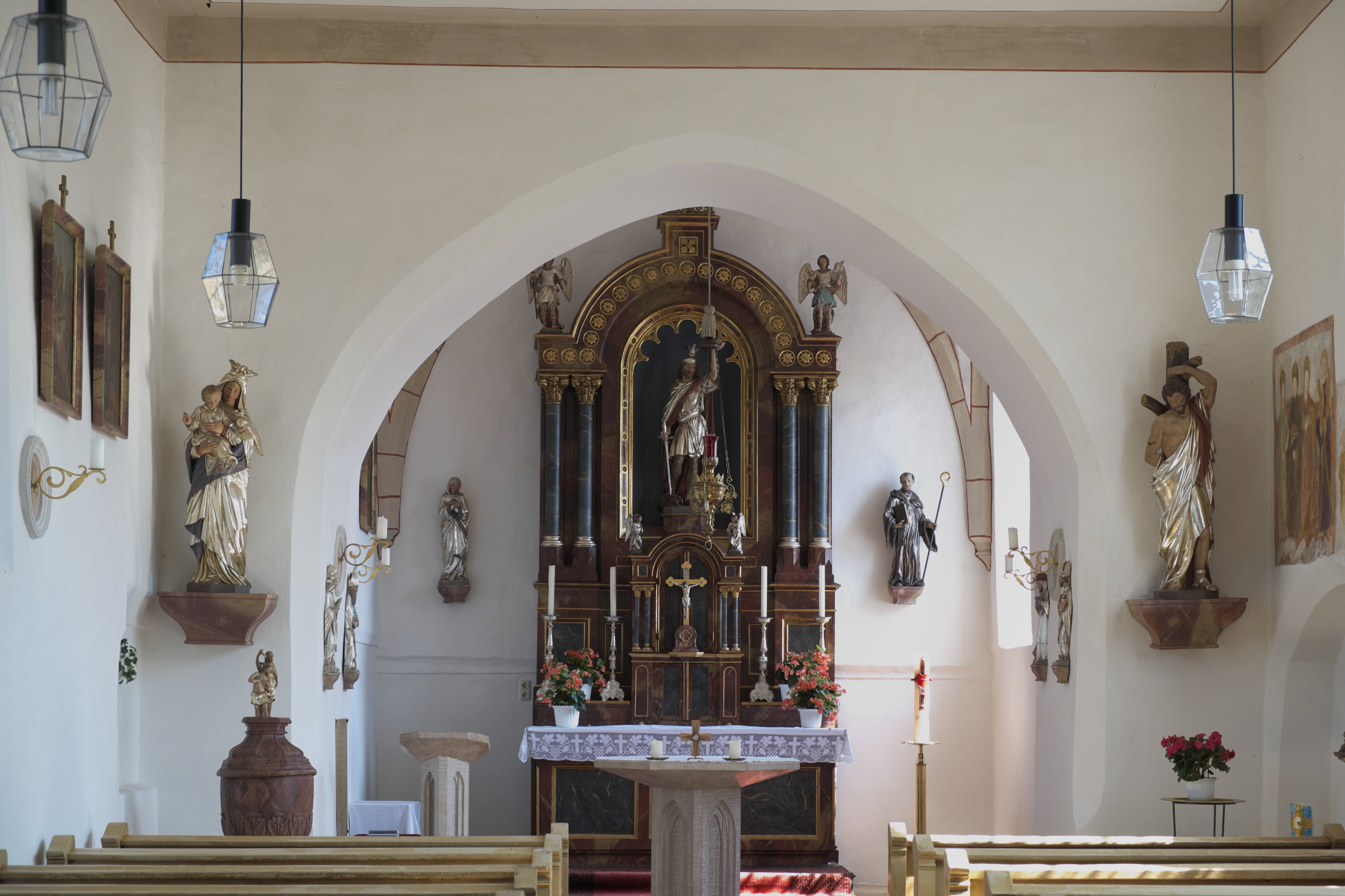 Alte katholische Pfarrkirche St. Georg in Oberpfaffenhofen (Weßling) im Landkreis Starnberg (Bayern, Deutschland), Chor